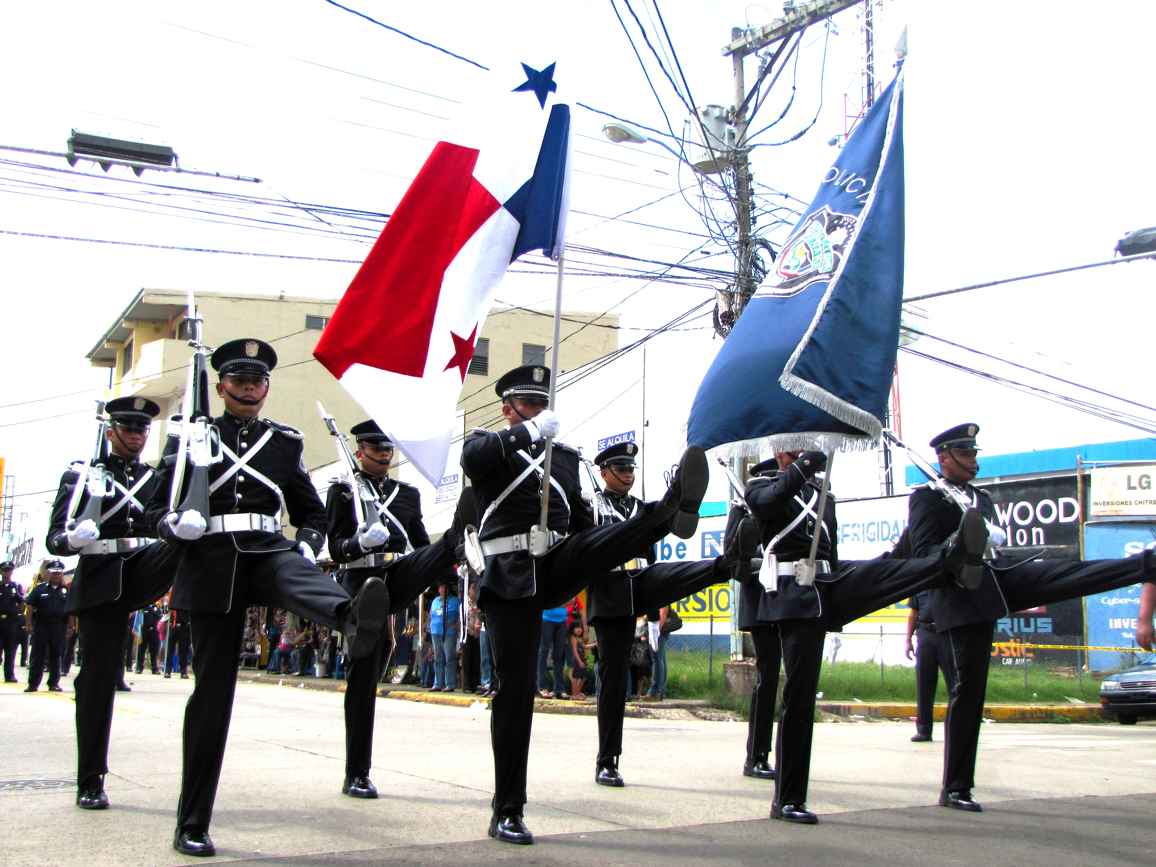 Escolta protocolar de la Bandera Nacional de la República de Panamá y la Bandera de la Policía Nacional durante un desfile civico por motivo de las fistas patrias en Ciudad de Panamá. se encontraba al mando del Capitan Jorge Luis Bryant y el Teniente Nicomedes Fernandez